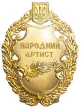 Нагрудний знак до почесного звання «Народний артист України»